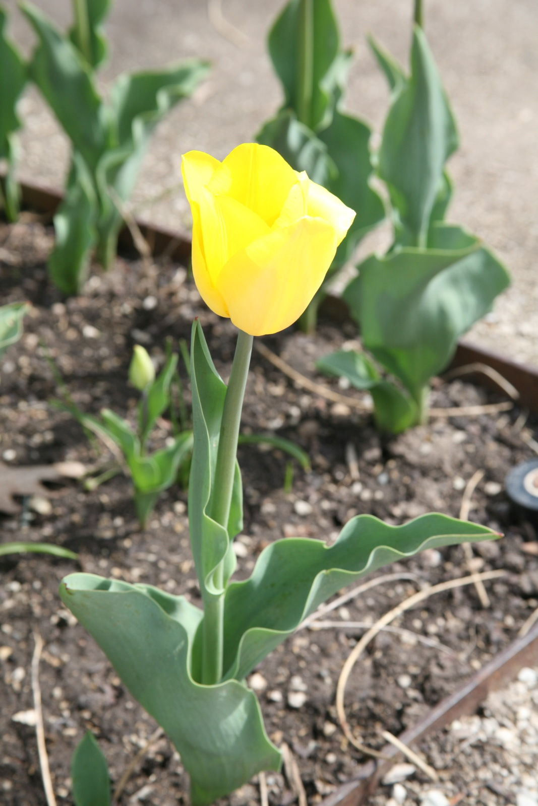 Triumph Tulip Strong Gold (Tulipa)